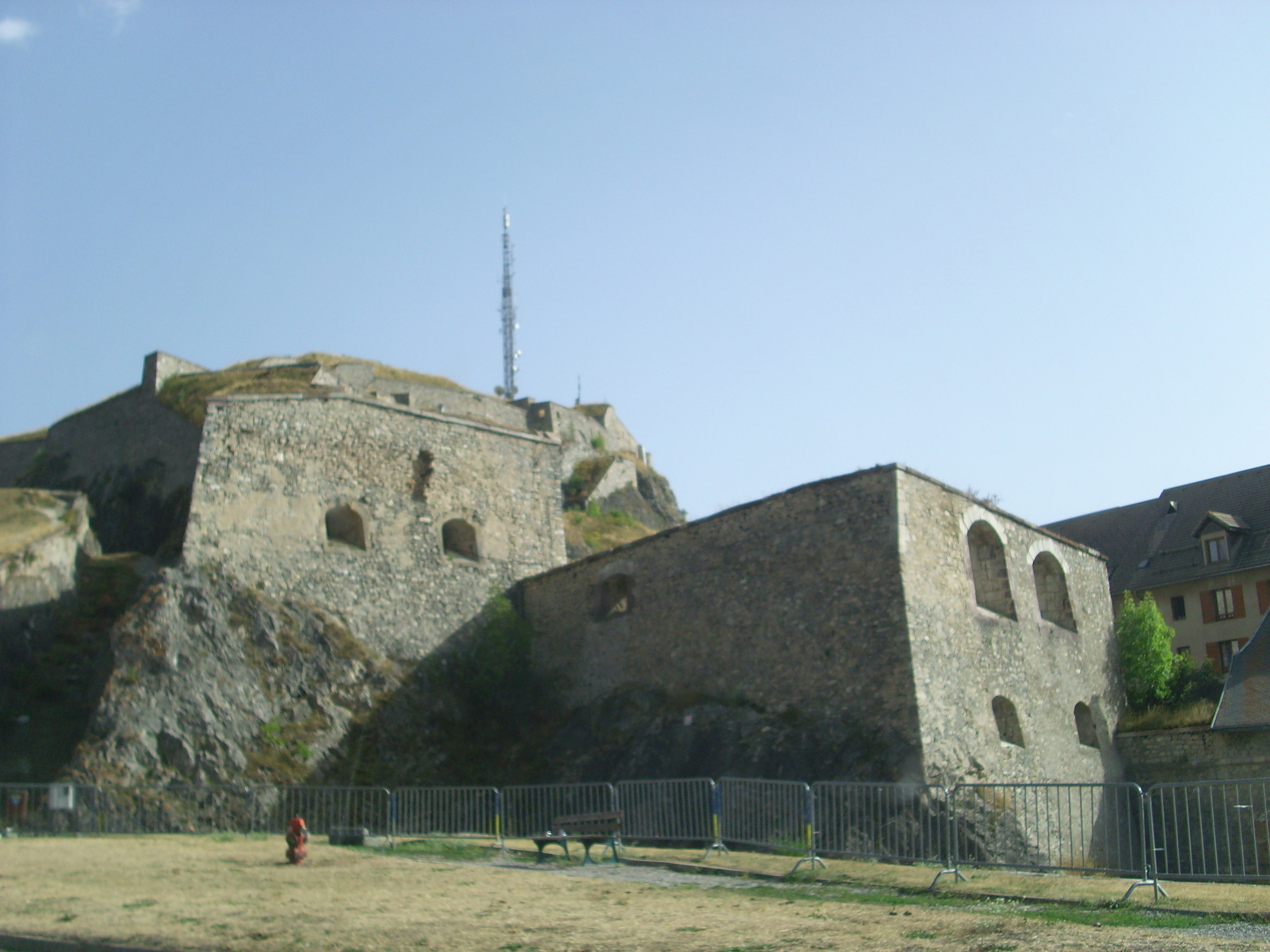 La cittadina di Briançon, Francia